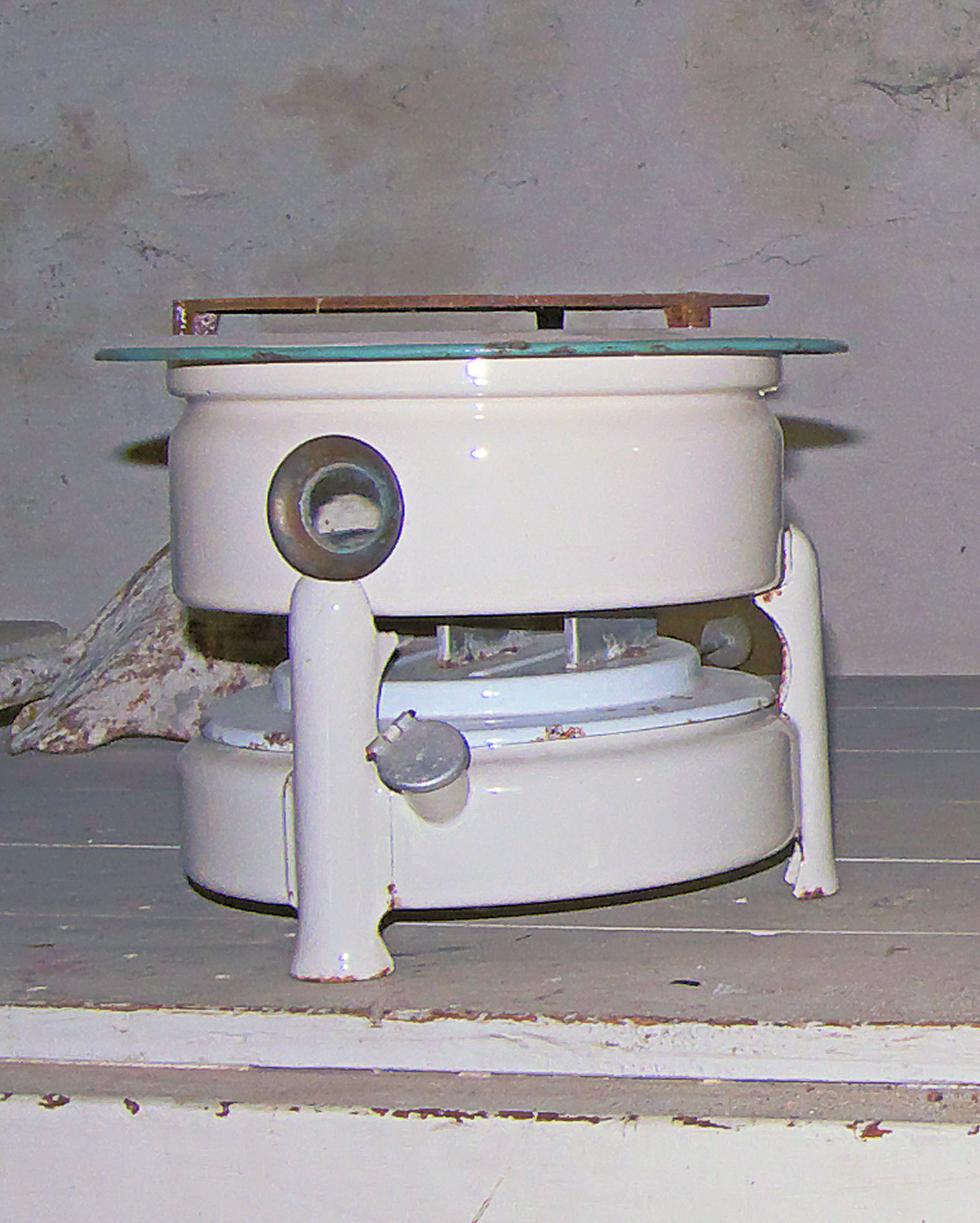 Emmamolen Nieuwkuijk, petroleumstel